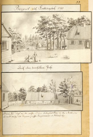 Scan from Johann Christoph Brotze's book Sammlung verschiedner Liefländischer Monumente. [1] Prospect auf Kummingshof. 1795 [die Ansicht]. [2] Auf eben demselben Hofe. Dieser Hof liegt an der rothen Düna unterhalb Riga an der Stelle, wo ehemals das Gesinde Pampau (nachher Jaunsemneeks od. Niebuhr) lag [Kummingshof; die Ansicht].